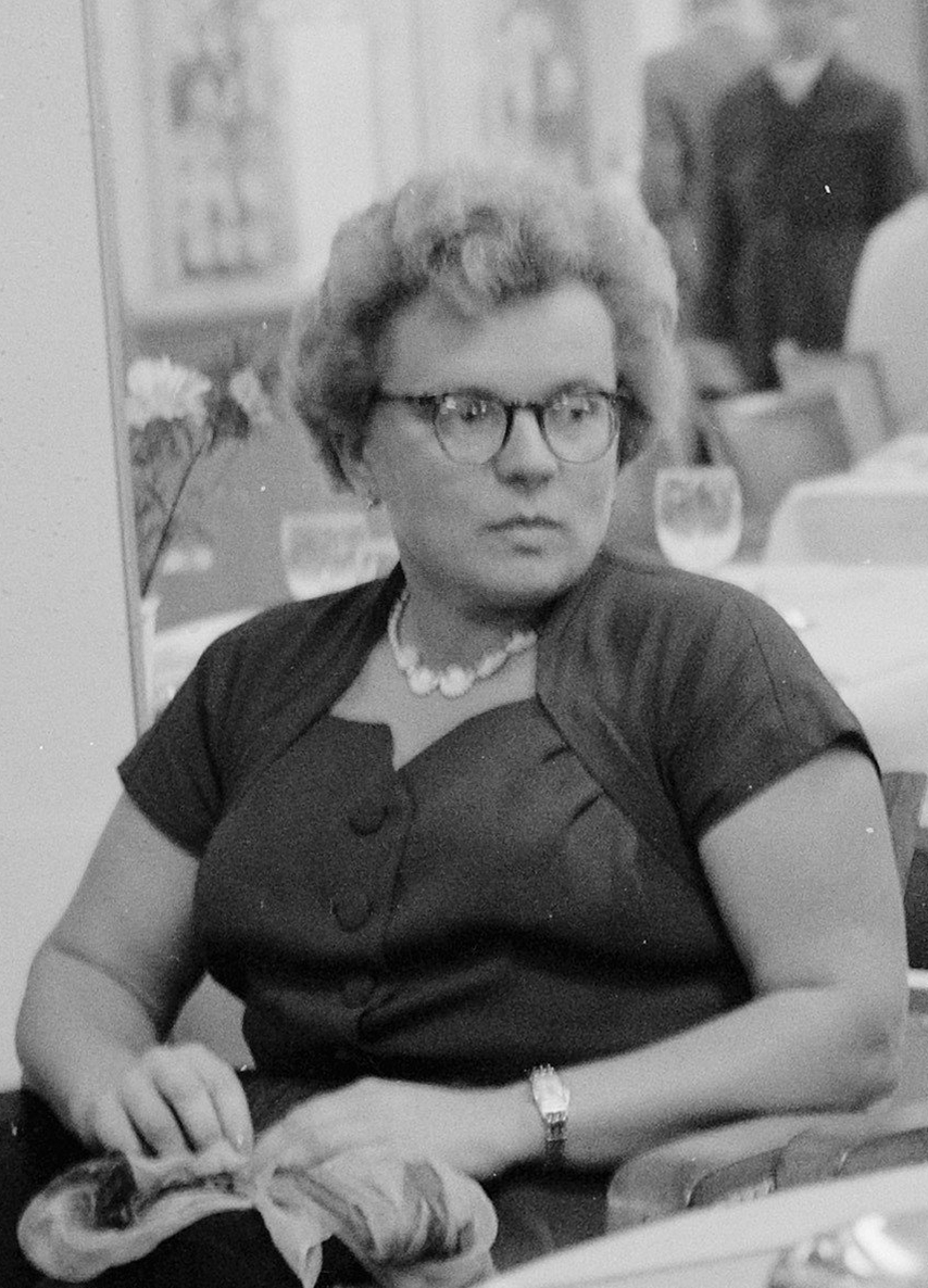 Aankomst deelneemsters landenschaaktoernooi te Emmen. Kira Zvorykina